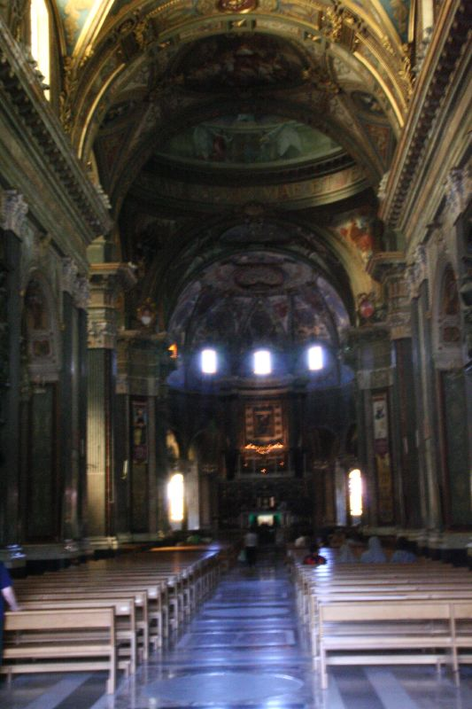 Pompei, Campania, Italia